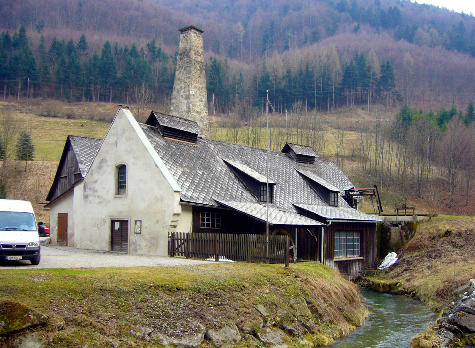 Werksgebäude des ehem. Hammerwerkes Hammer in der Öd/ Wasserhammerwerk d. Schraubstockfabrik Leander Grabner, Gaming, NÖ